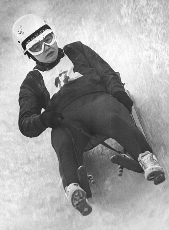 Ortrun Enderlein Zentralbild Gahlbeck 23.2.1964 Friedrichroda erlebte Deutsche Meisterschaften im Rennschlittensport-Deutsche Rennschlittenmeister im Einsitzer wurden am 23.2.1964 in Friedrichroda (Thüringen) nach dramatischen Kampf die Olympia-Goldmedaillengewinnerin Ortrun Enderlein und der 19jährige Michael Köhler, der Bruder des Goldmedaillengewinners von Innsbruck, Thomas Köhler (beide SC Traktor Oberwiesenthal). UBz: Ortrun Enderlein in Aktion.